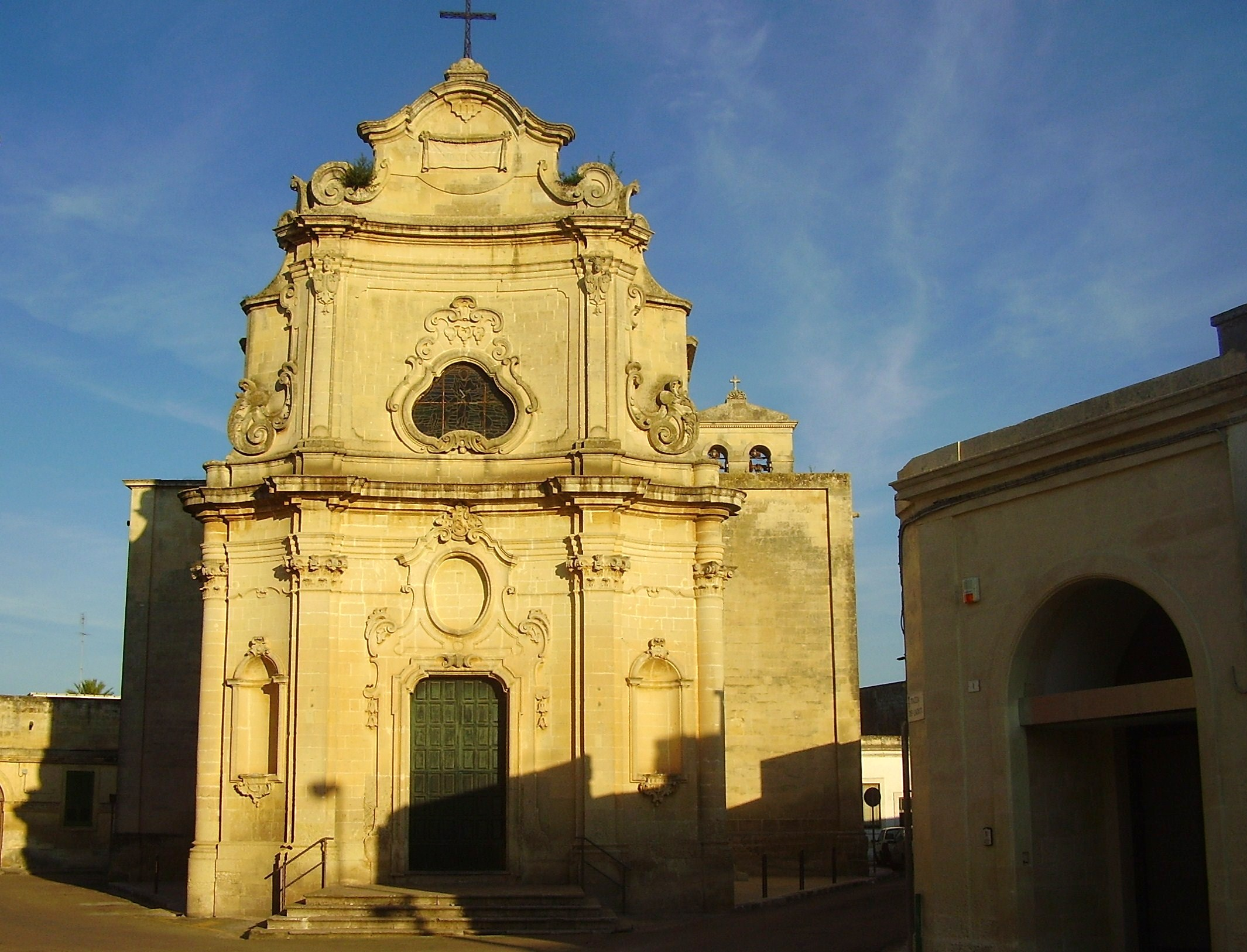 Chiesa Castri di Lecce